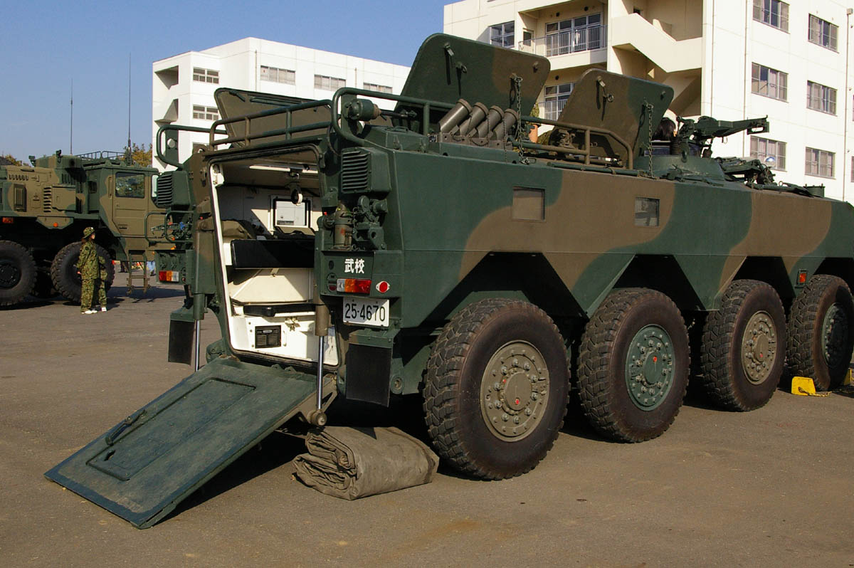 JGSDF Type96 APC.In Camp Matsudo,Japan. ja:96式装輪装甲車 2007年11月18日、松戸駐屯地で撮影。